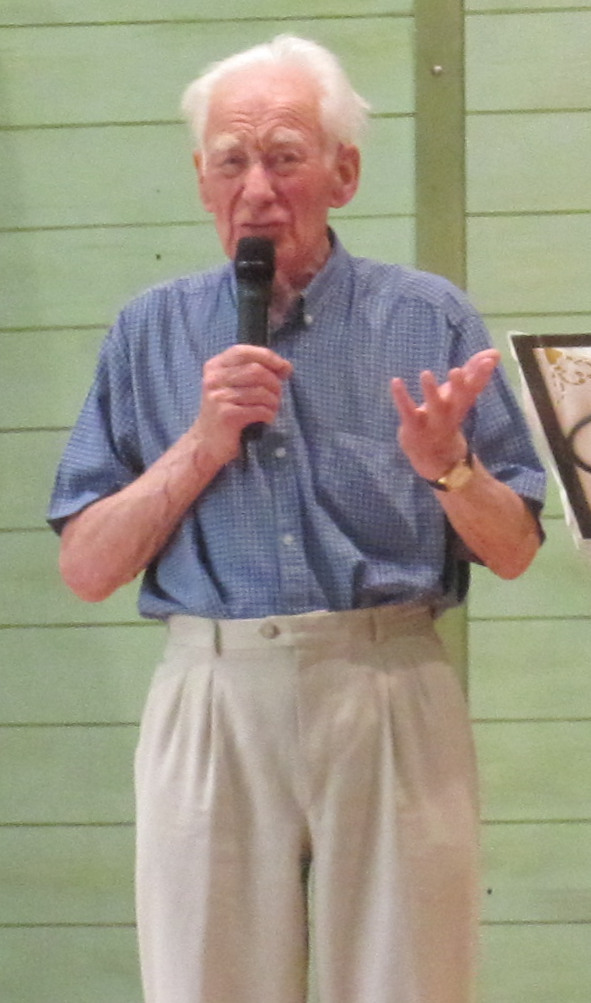 Nrf: L'Assemblèye eud Normandie (La Fête des Rouaisouns) - fête d'la langue Nouormande à Fotaine-eul-Bourg 5-6 d'Juîn 2010. Lucien Malot.